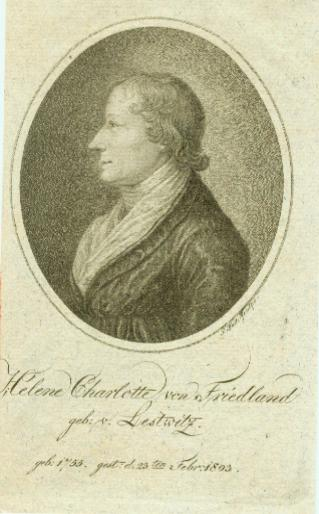 Helene Charlotte von Friedland (1754–1803), brandenburgische Adlige